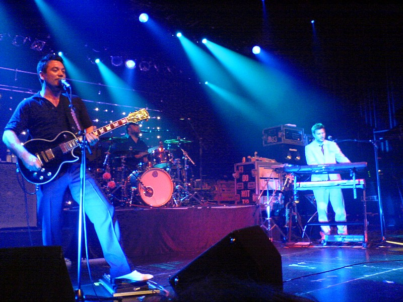 Fun Lovin' Criminals